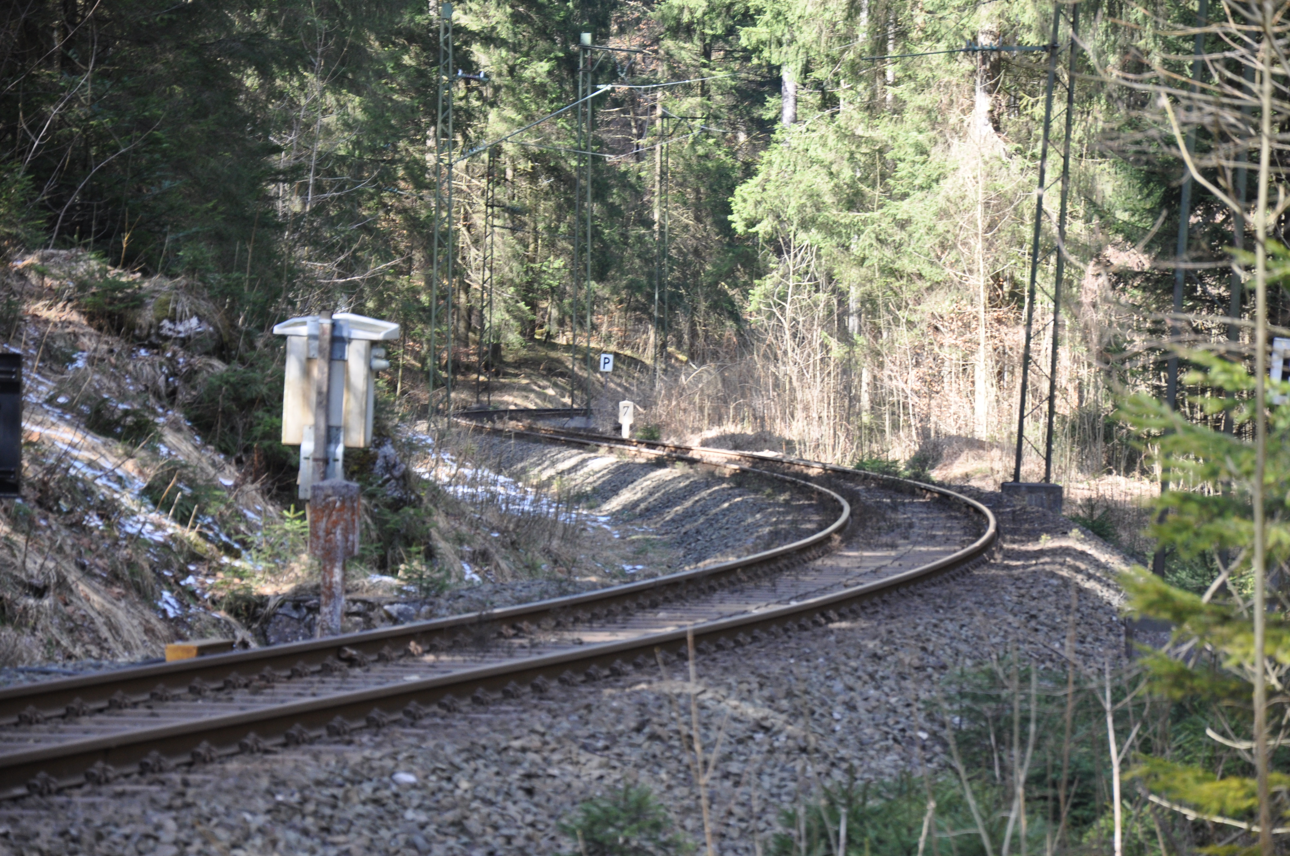 Steilstrecke der Bahnstrecke Freilassing–Berchtesgaden kurz vor Hallthurm Bei Verwendung bitte ich hier um einen Hinweis, wo das Foto genutzt wird.